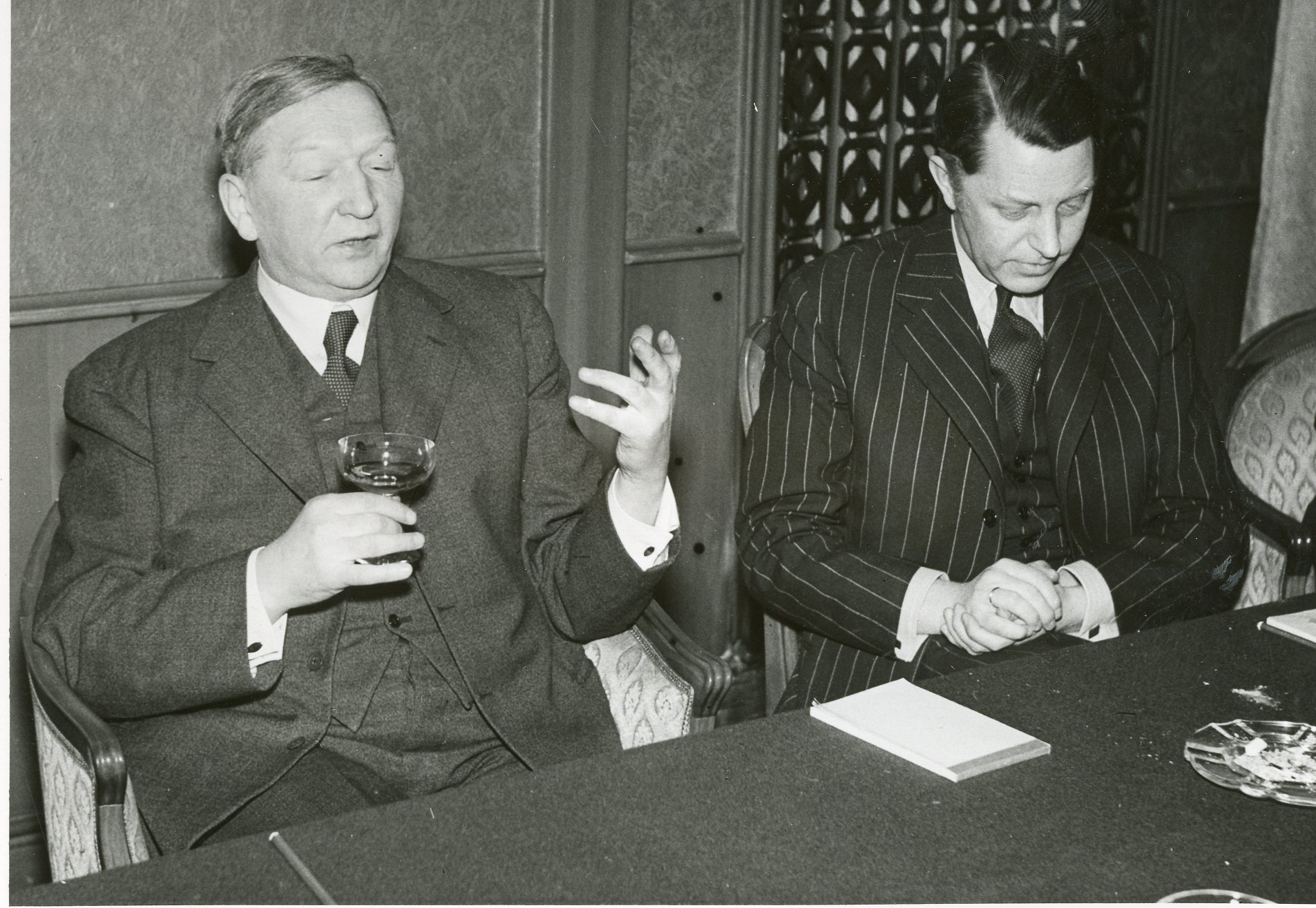 Professor Worm- Müller på pressekonferanse I Sverige. Dette bilde er tatt på en pressekonferanse i Stockholm den 18. Mars i år, da professor Worm-Müller, som nettopp er kommet til Sverige fra England, orienterte den svenske presse om Den norske regjerings og Det frie Norges virksomhet. Professoren sees til venstre, til høyre presseattasje Jens Schive ved den norske legasjon i Stockholm. London, 17.4.44 RA/PA-1209/Uc/66/7/S 5005B